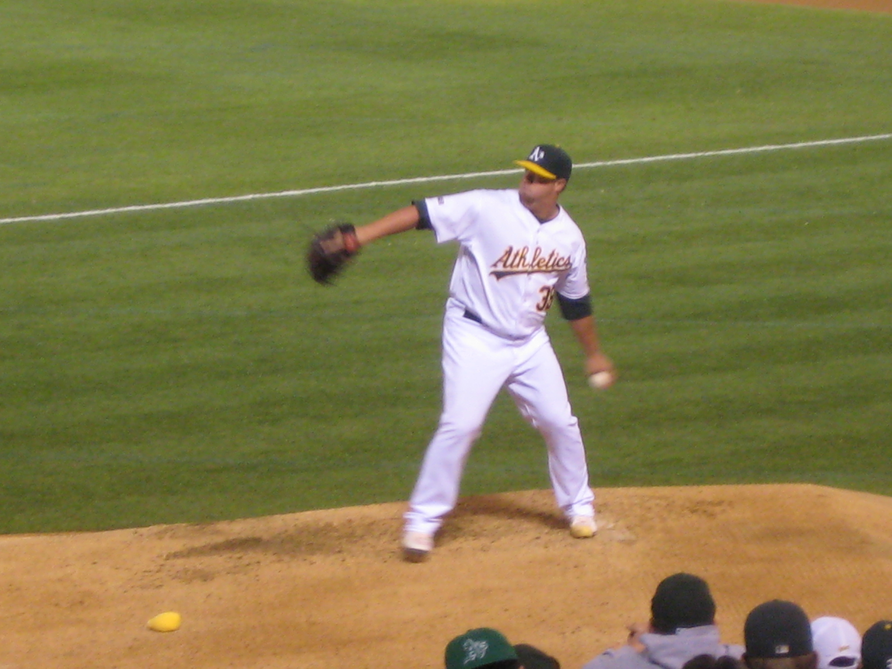 Brad Kilby 05:30, 23 September 2009 . . Jrchun . . 3,072×2,304 (970 KB)